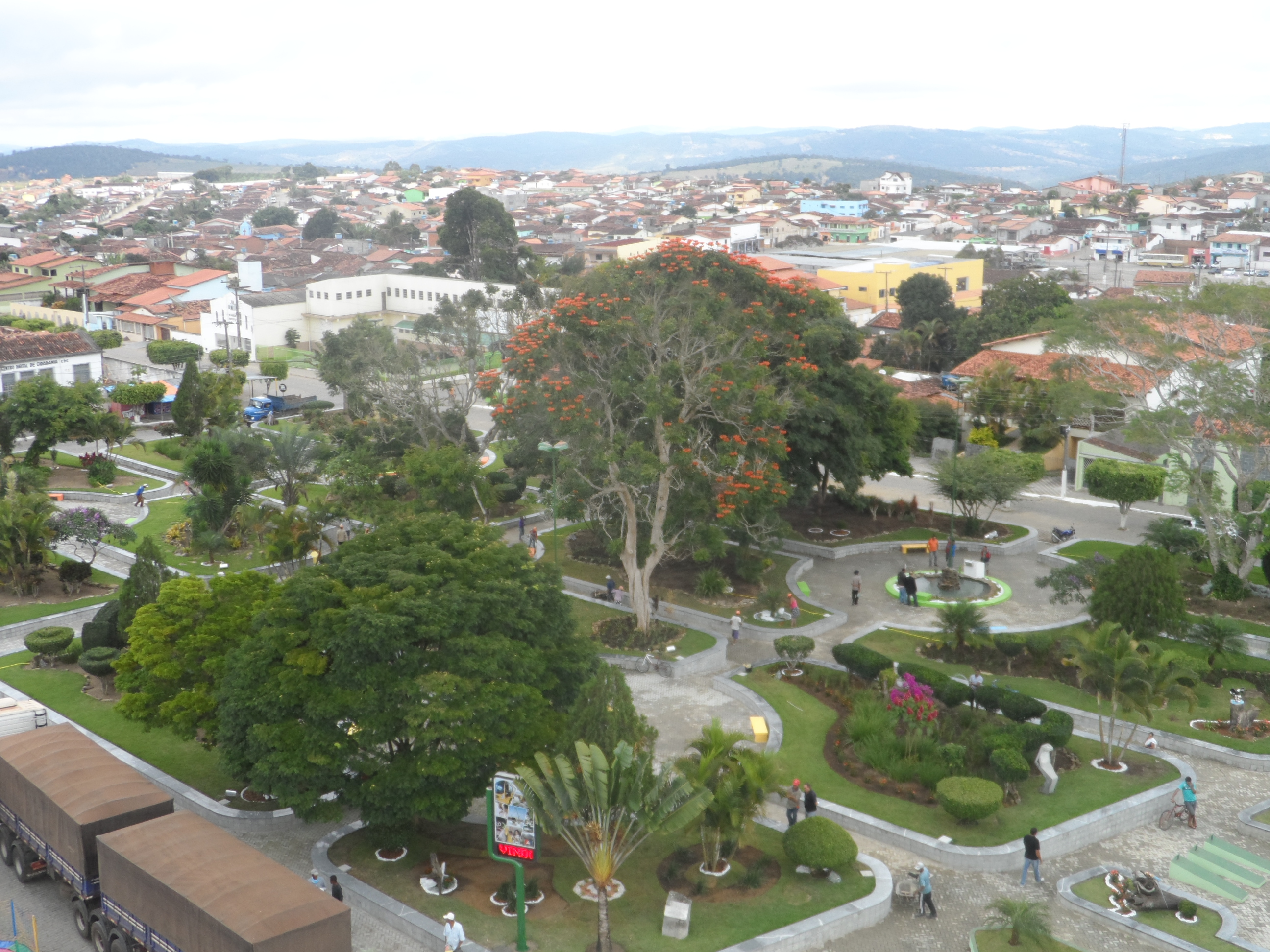 Cidade de Itiruçu